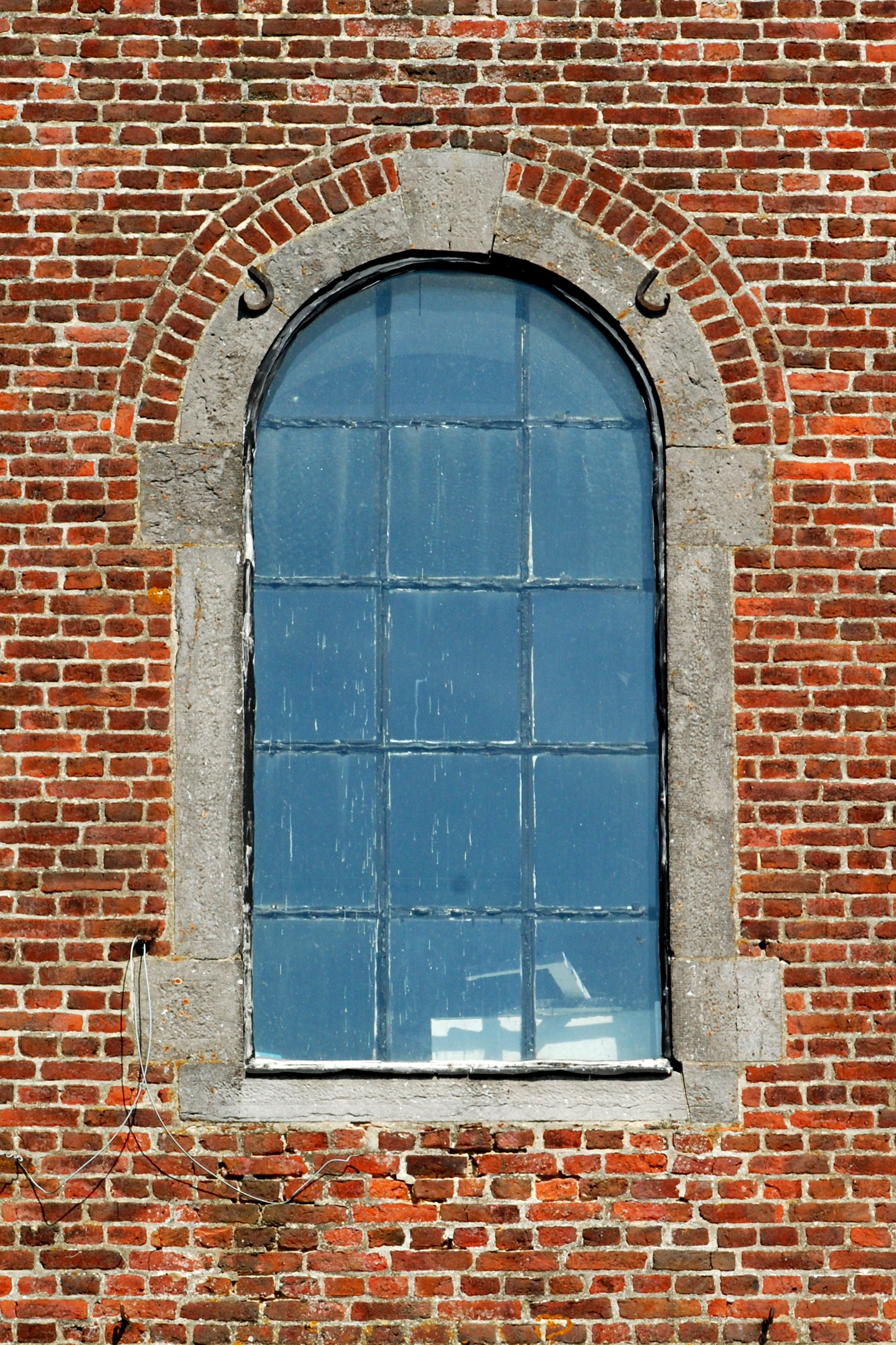 Belgique - Brabant wallon - Mont-Saint-Guibert - Église Saint-Pierre de Corbais (classique, 1773)